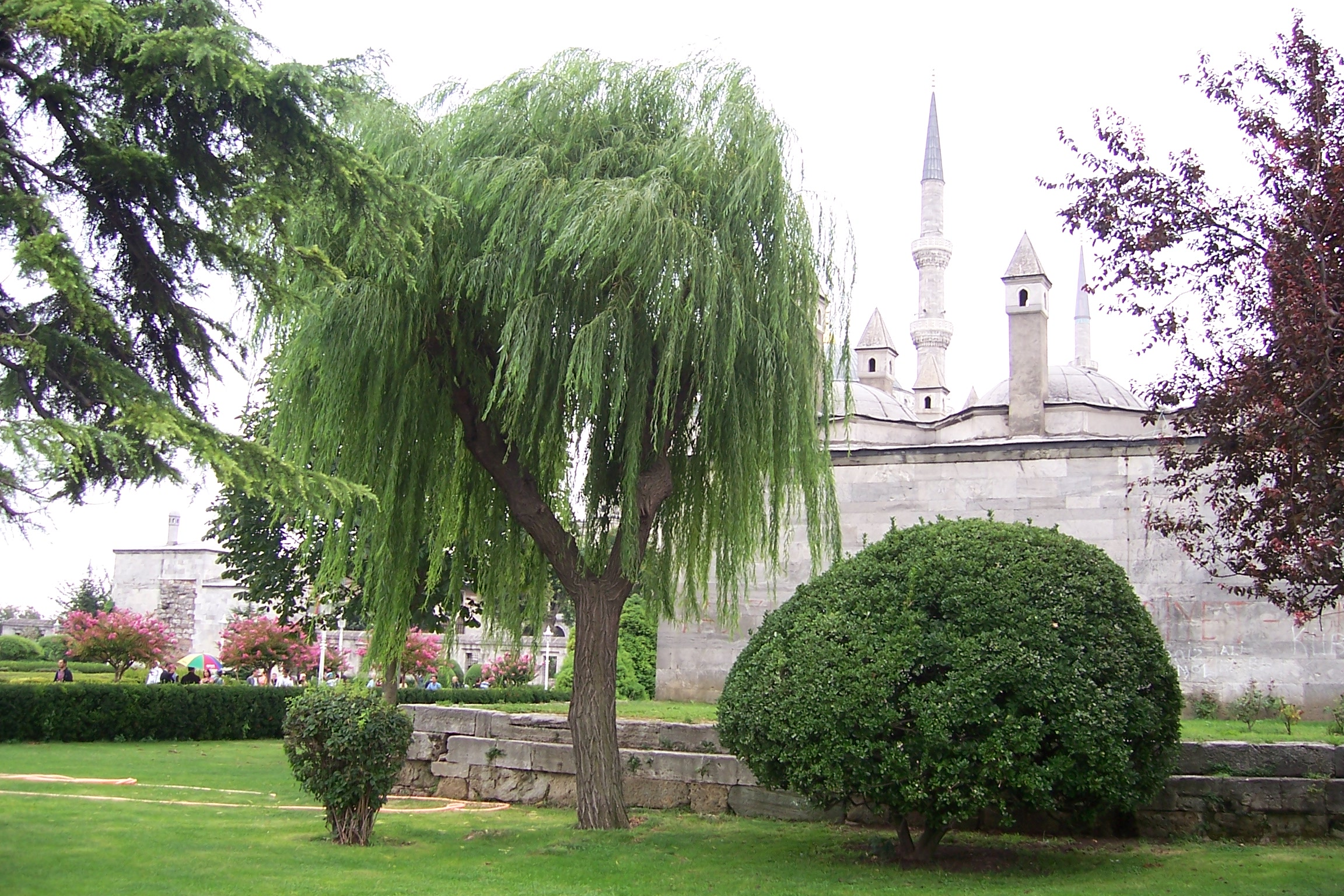 Salix babylonica taken in Istanbul, Turkey